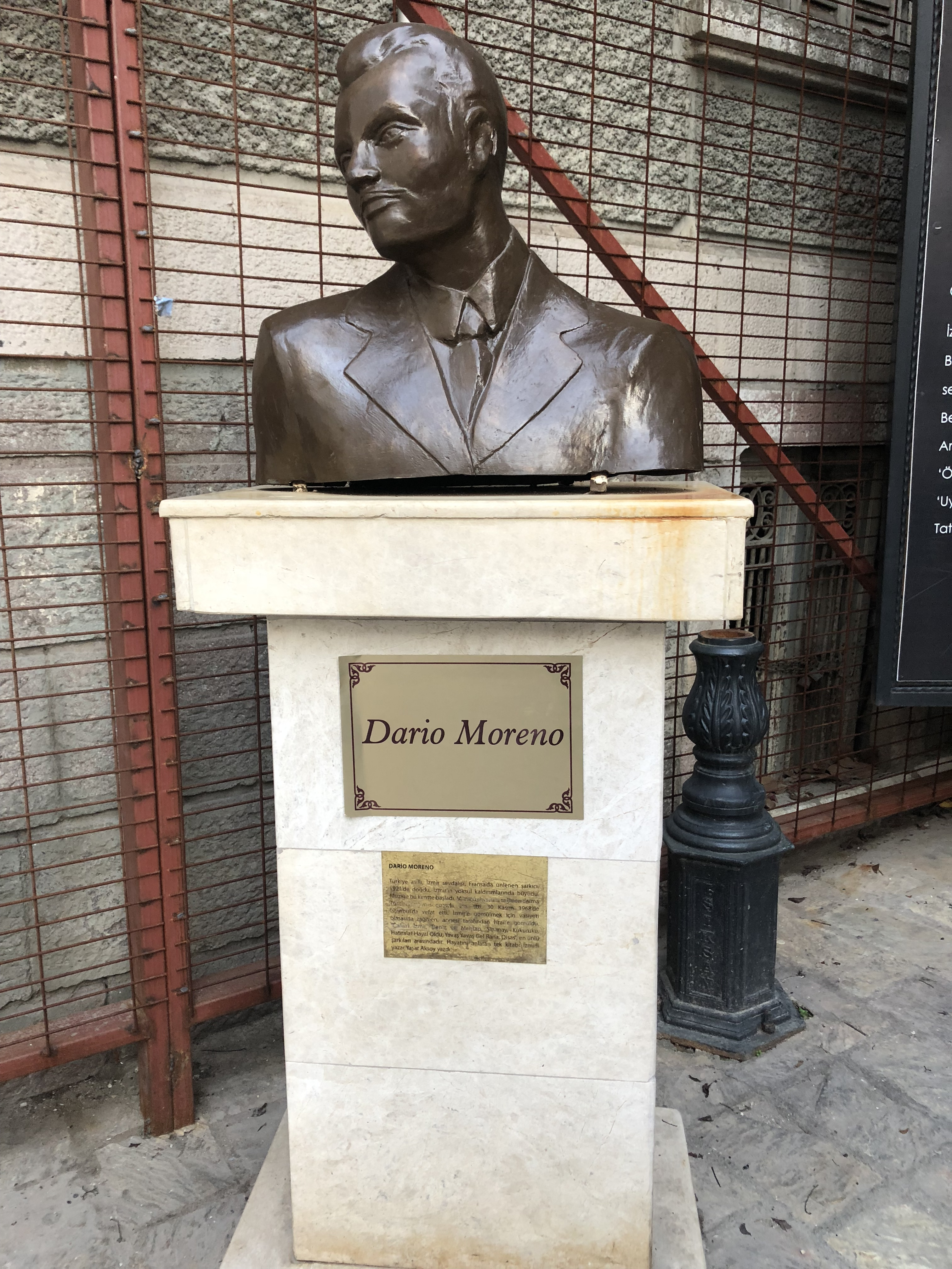 Dario Moreno sokağının başındaki Moreno Büstü